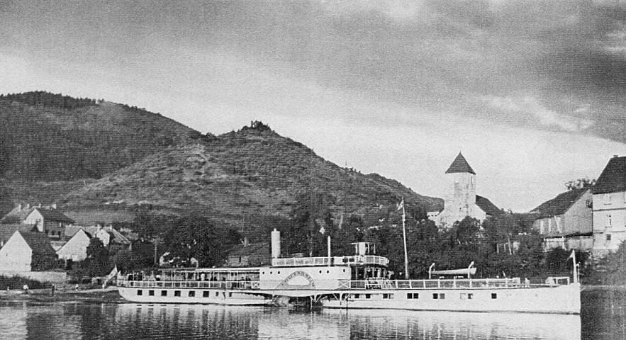 Raddampfer Kaiser Wilhelm in Rühle